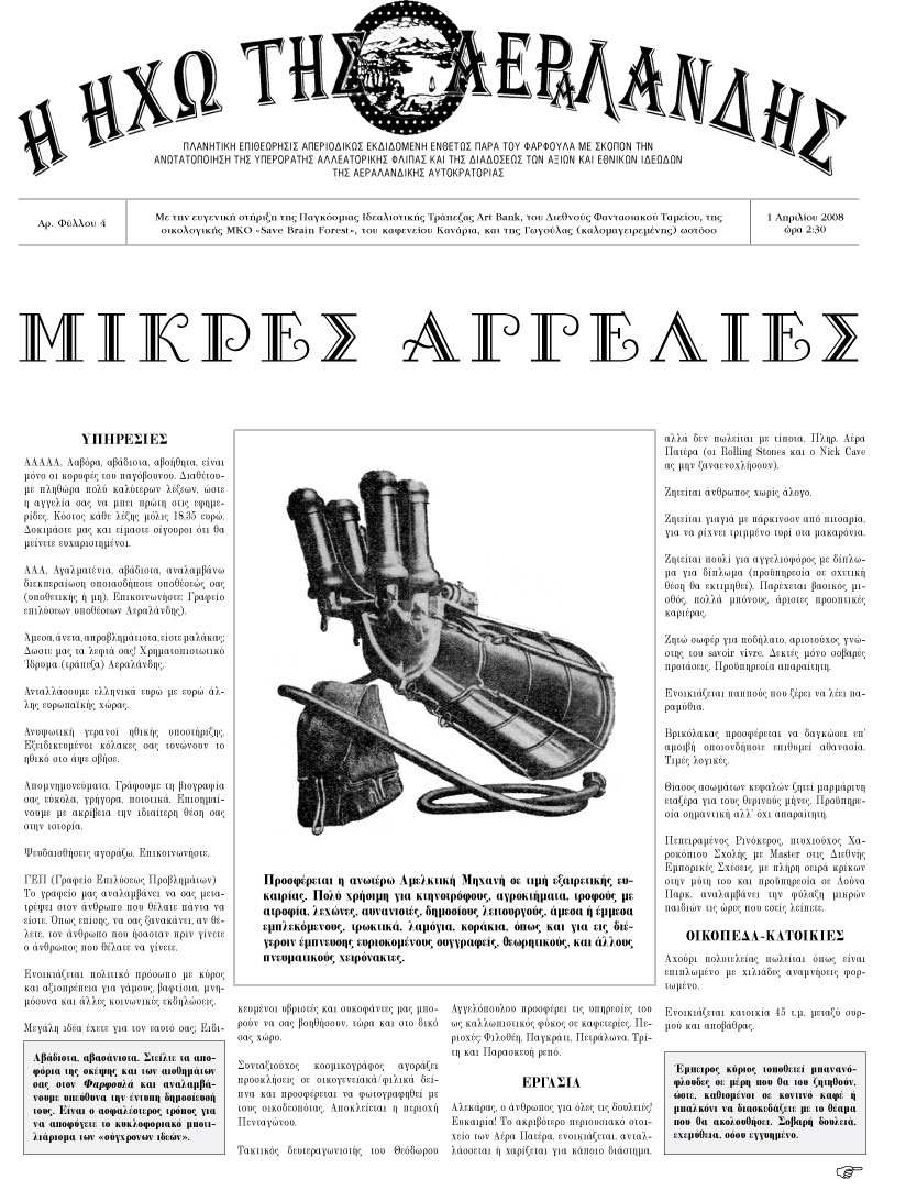 Το εξώφυλλο του φύλλου 4 της Ηχούς της Αεραλάνδης